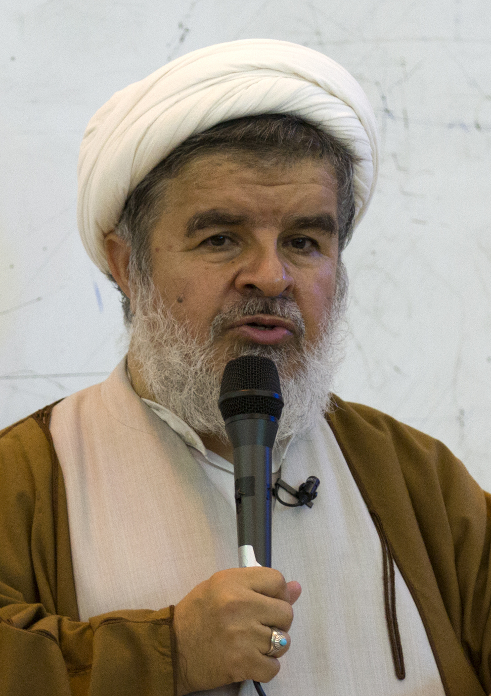 محمدحسن راستگو (متولد ۱۳۳۲ در مشهد) روحانی ایرانی و پژوهشگر فقه و اصول و تعلیم و تربیت است. او مبتکر شیوه خاصی از آموزش و تفریح برای کودکان است.